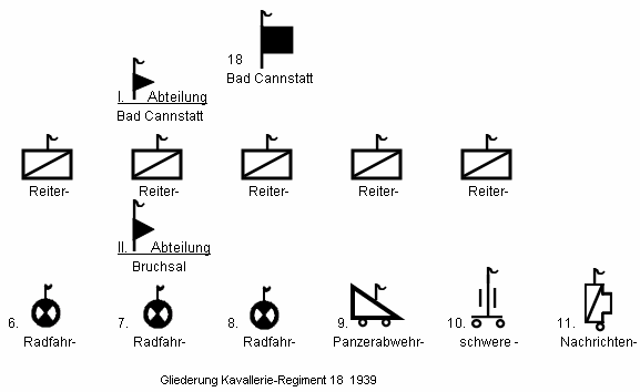 Gliederung Kavallerie-Regiment 18 der Wehrmacht 1939 (Taktische Zeichen der Wehrmacht)